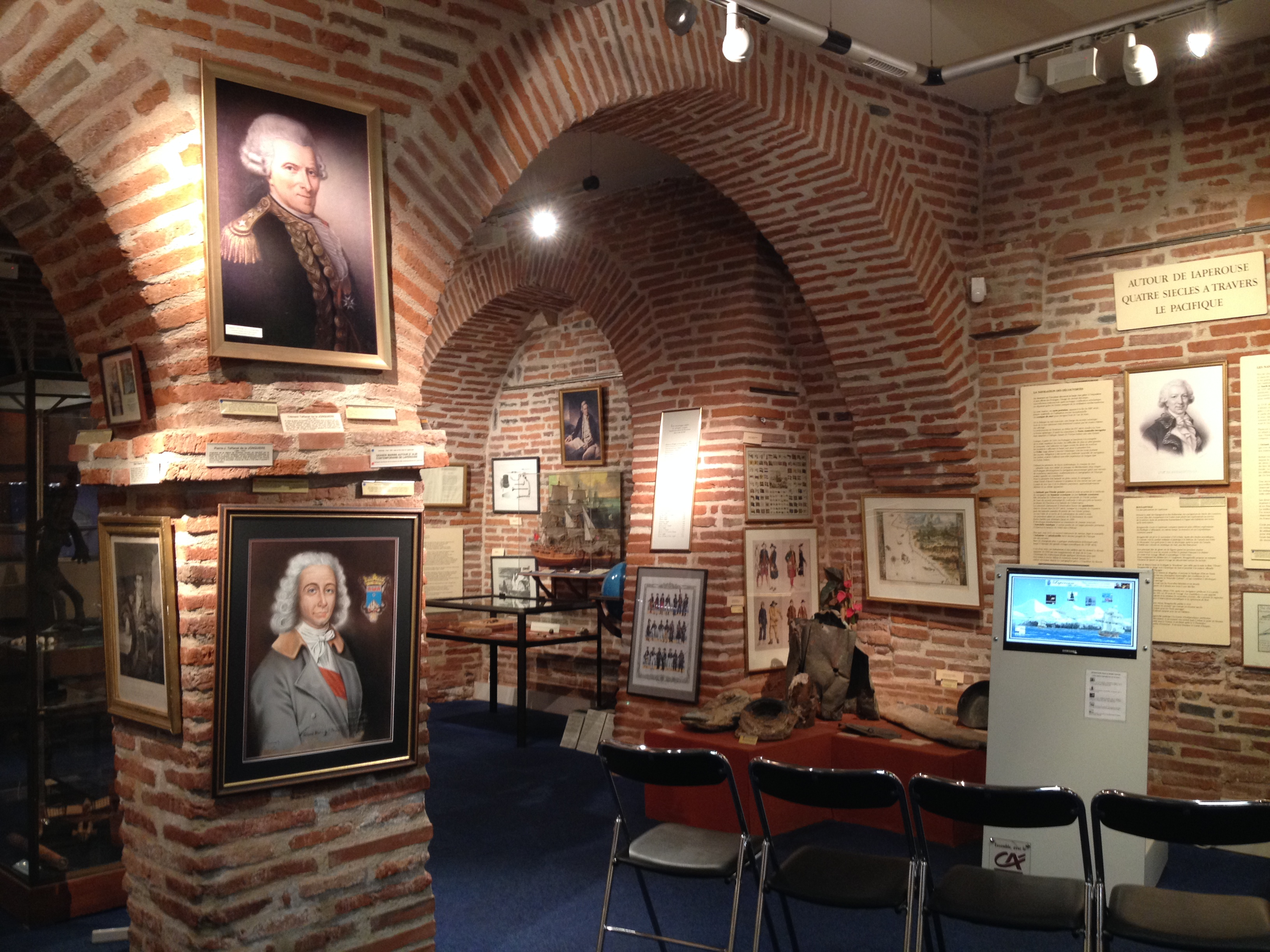 L'intérieur du musée Lapérouse d'Albi, parsemé de voûtes en brique rouge, garde l'aspect identitaire des moulins albigeois de l'époque.